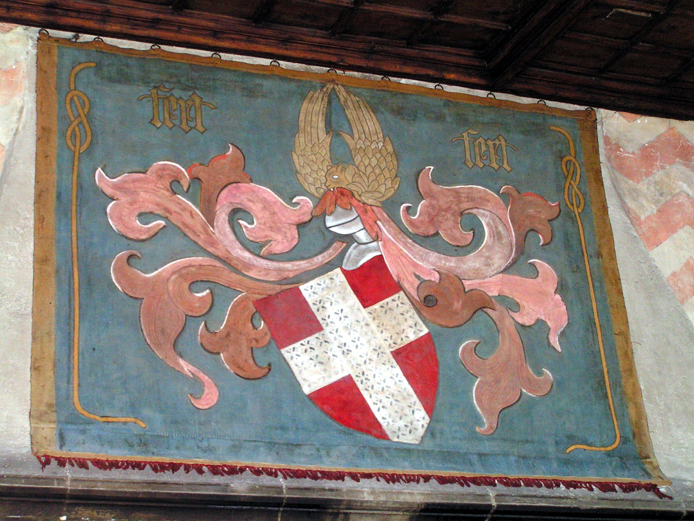 Wandwappen im Schloss Chillon, Veytaux-Montreux, Schweiz